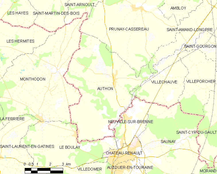 Carte des communes de France, centrée sur Authon (Loir-et-Cher, code Insee 41007)